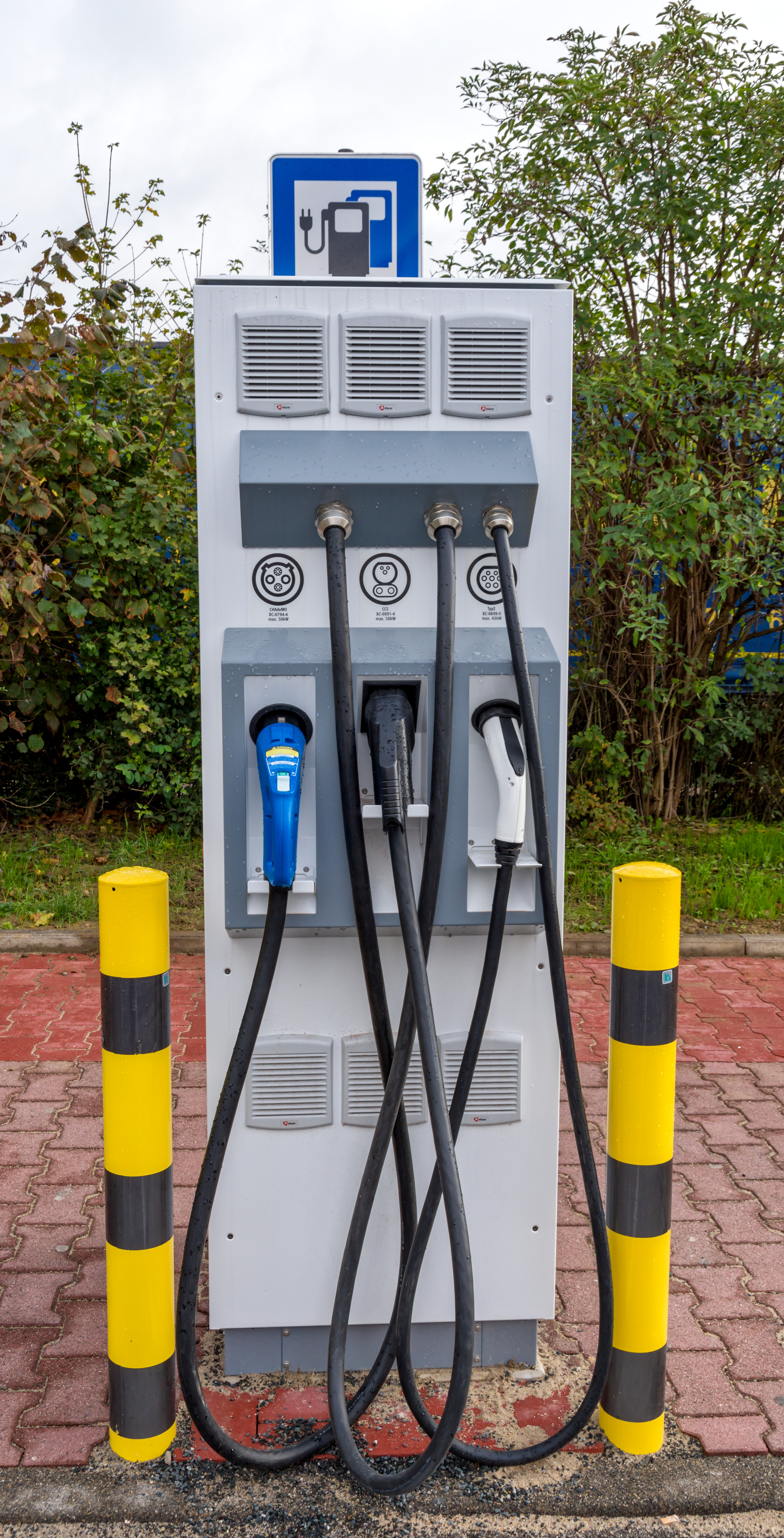 Die Stromtankstelle Medenbach West